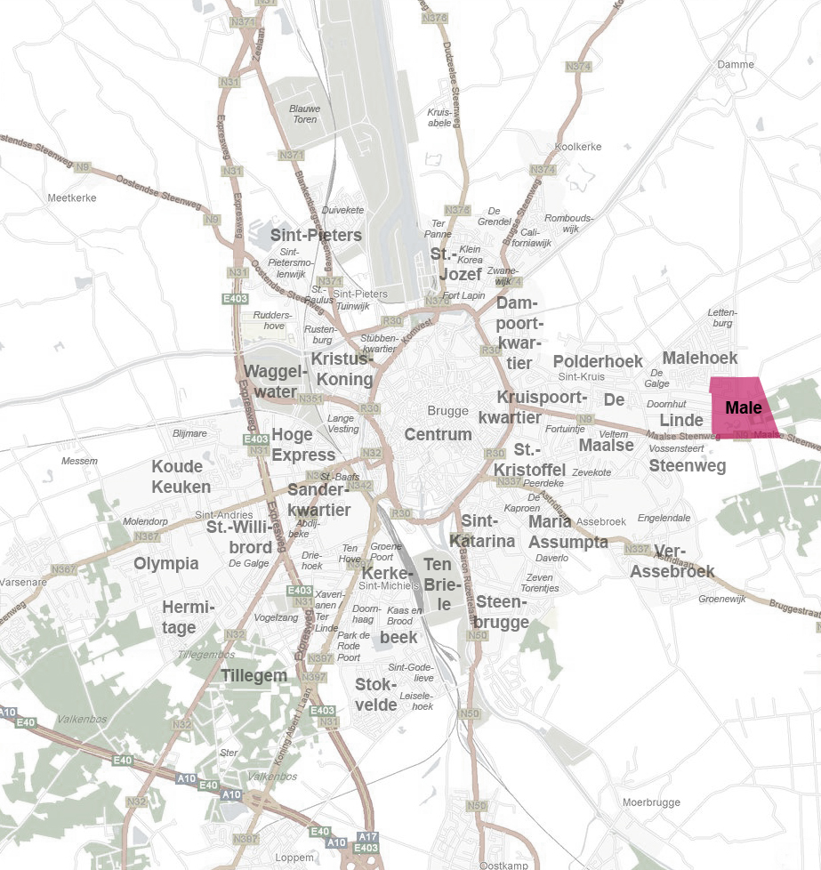 Wijk Male, Sint-Kruis, Brugge